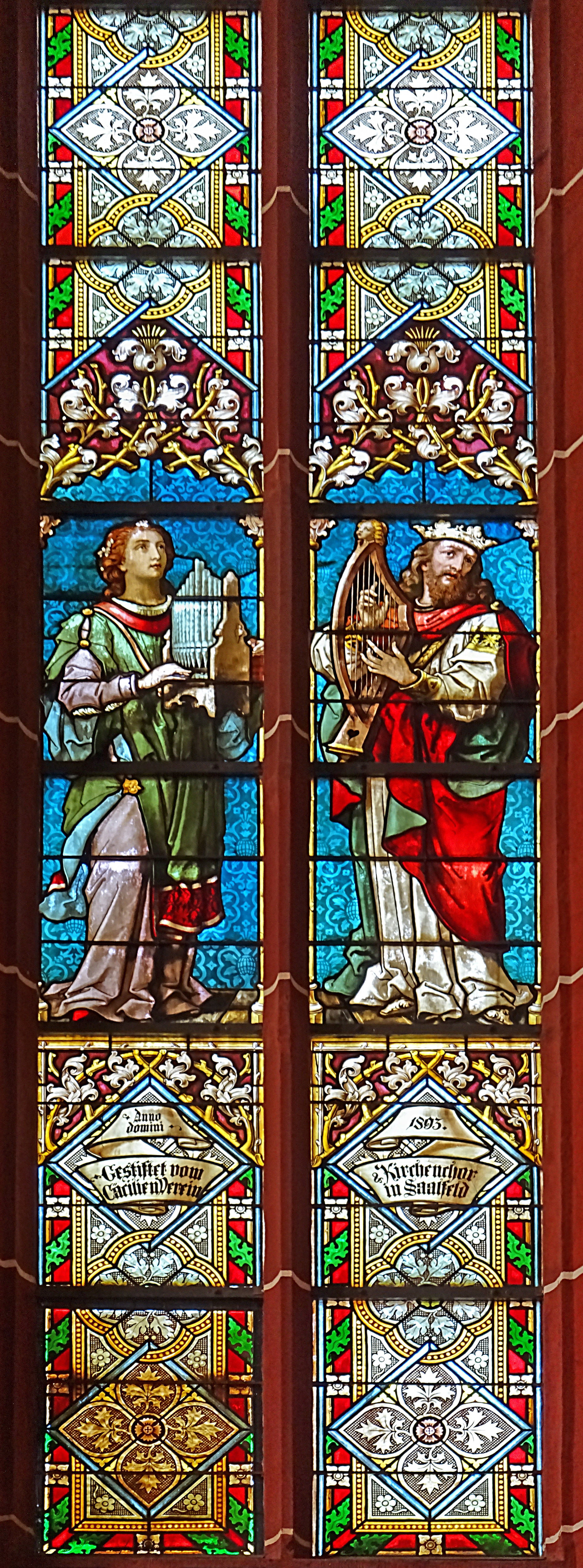 Musikfenster mit der Hl. Cäcilie und König David in der Johanneskirche Saalfeld